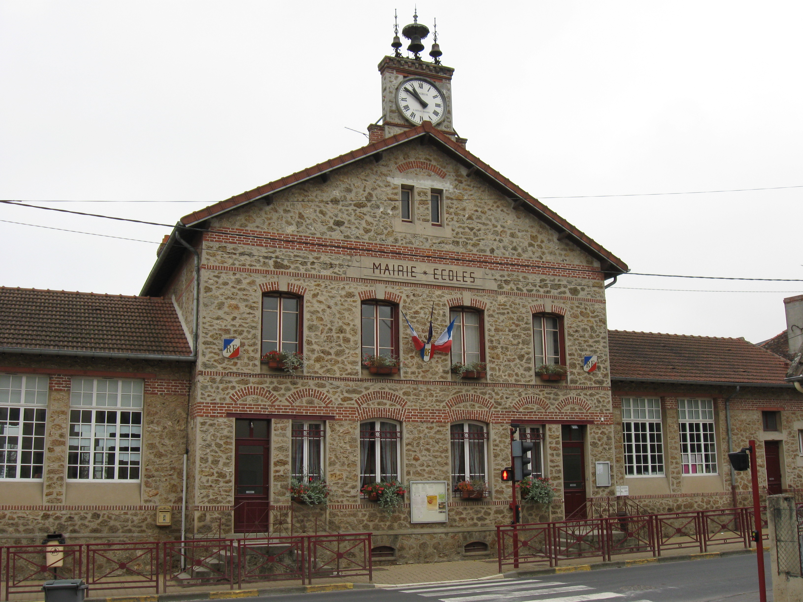 Mairie-école de Saulchery. (département de l'Aisne, région Picardie).